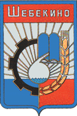 Радянський герб міста Шебекіно